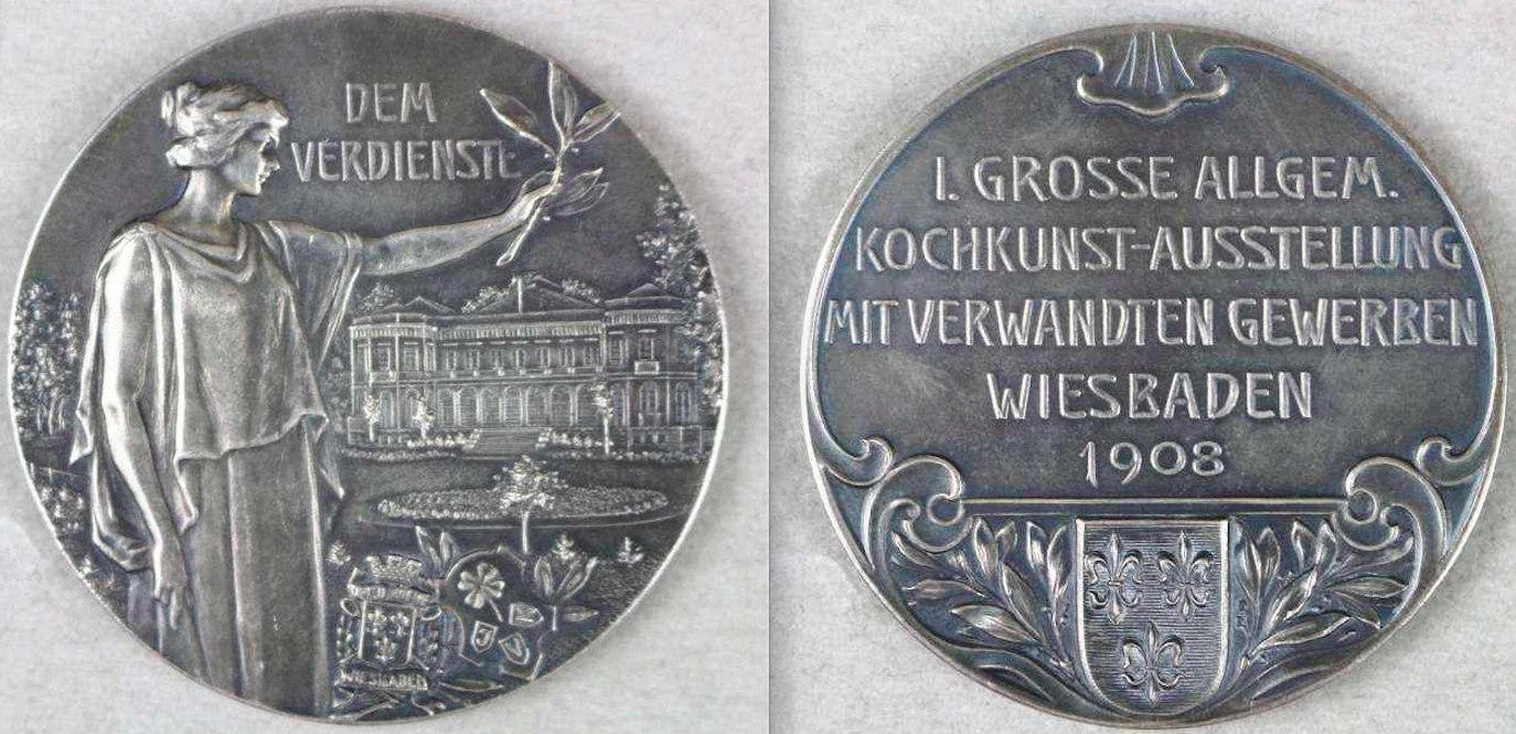 Silbermedaille anlässlich der 1. großen allgemeinen Kochkunst-Ausstellung mit verwandten Gewerben in Wiesbaden 1908; auf der Vorderseite ist unter dem Lorbeerzweig eine Ansicht der Hauptfassade des Paulinenschlösschens zu sehen, das Veranstaltungsort der Ausstellung war; Privatsammlung Wiesbaden